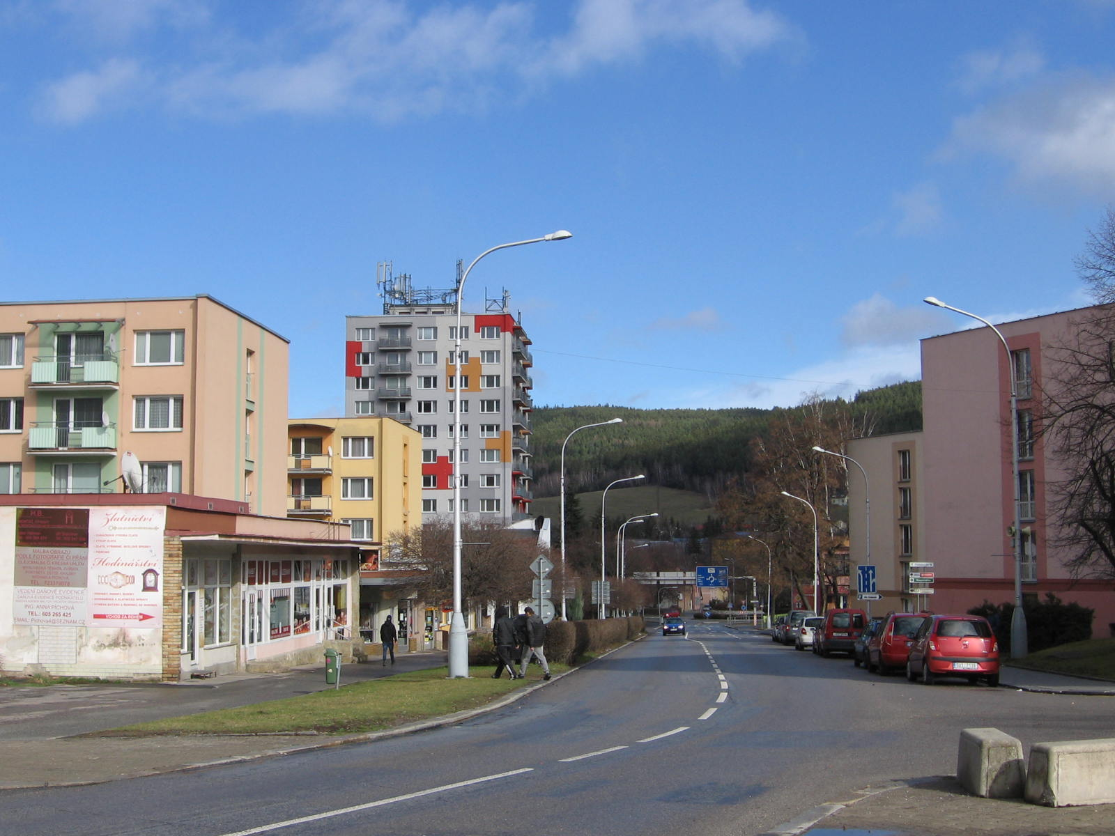 Zvolenská ulice v Prachaticích